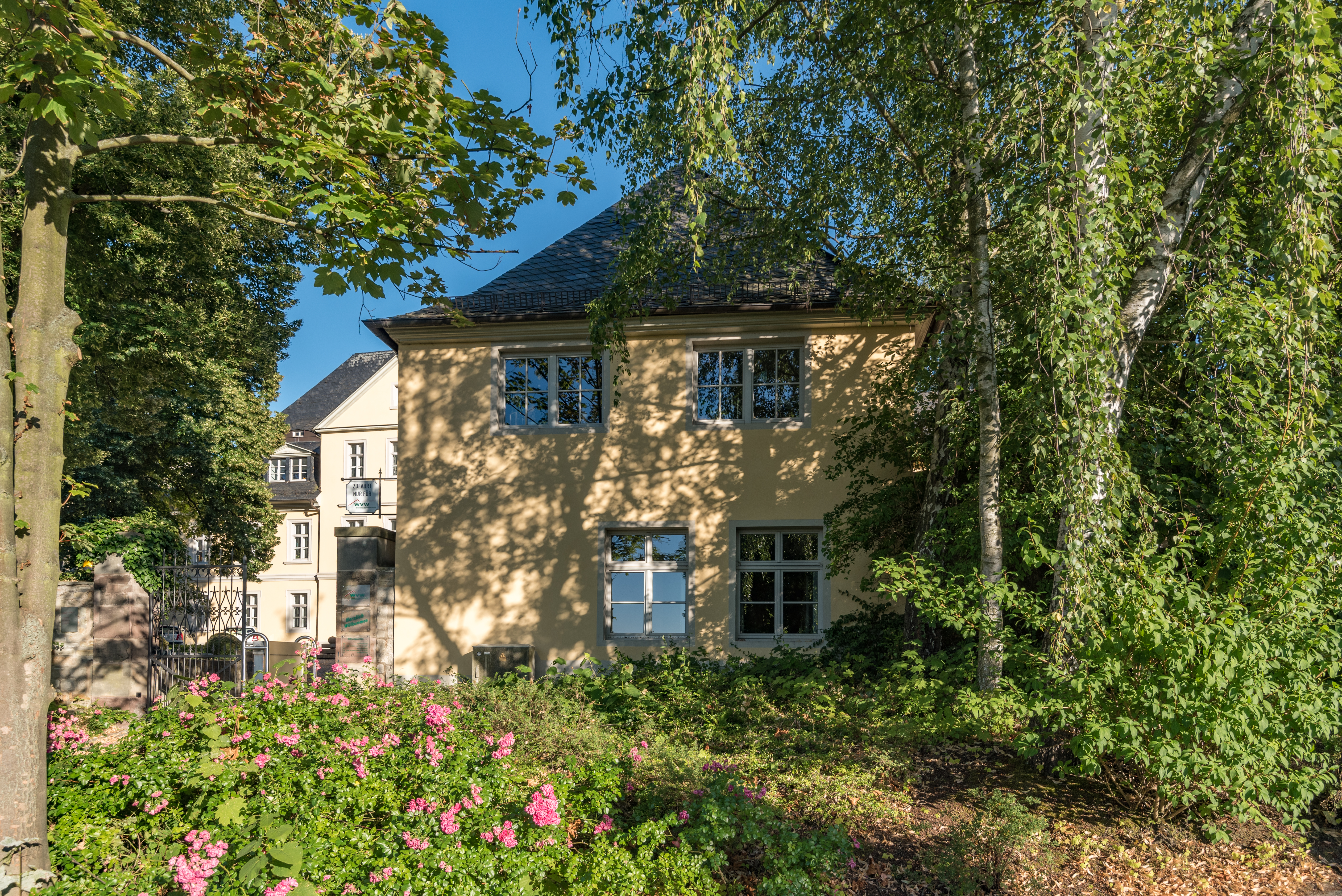 Weißenfels, Georgenberg 23